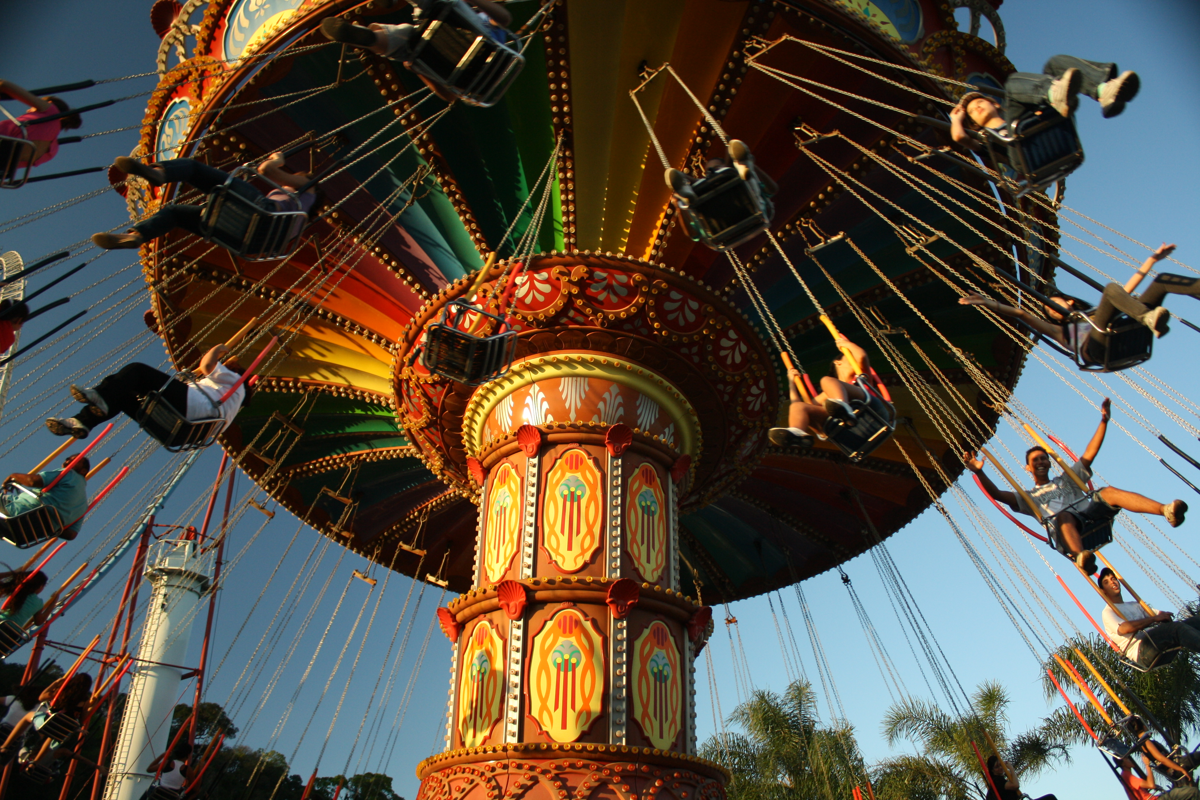 Atração "Parangolé" no parque temático Hopi Hari em Vinhedo, São Paulo, Brasil.